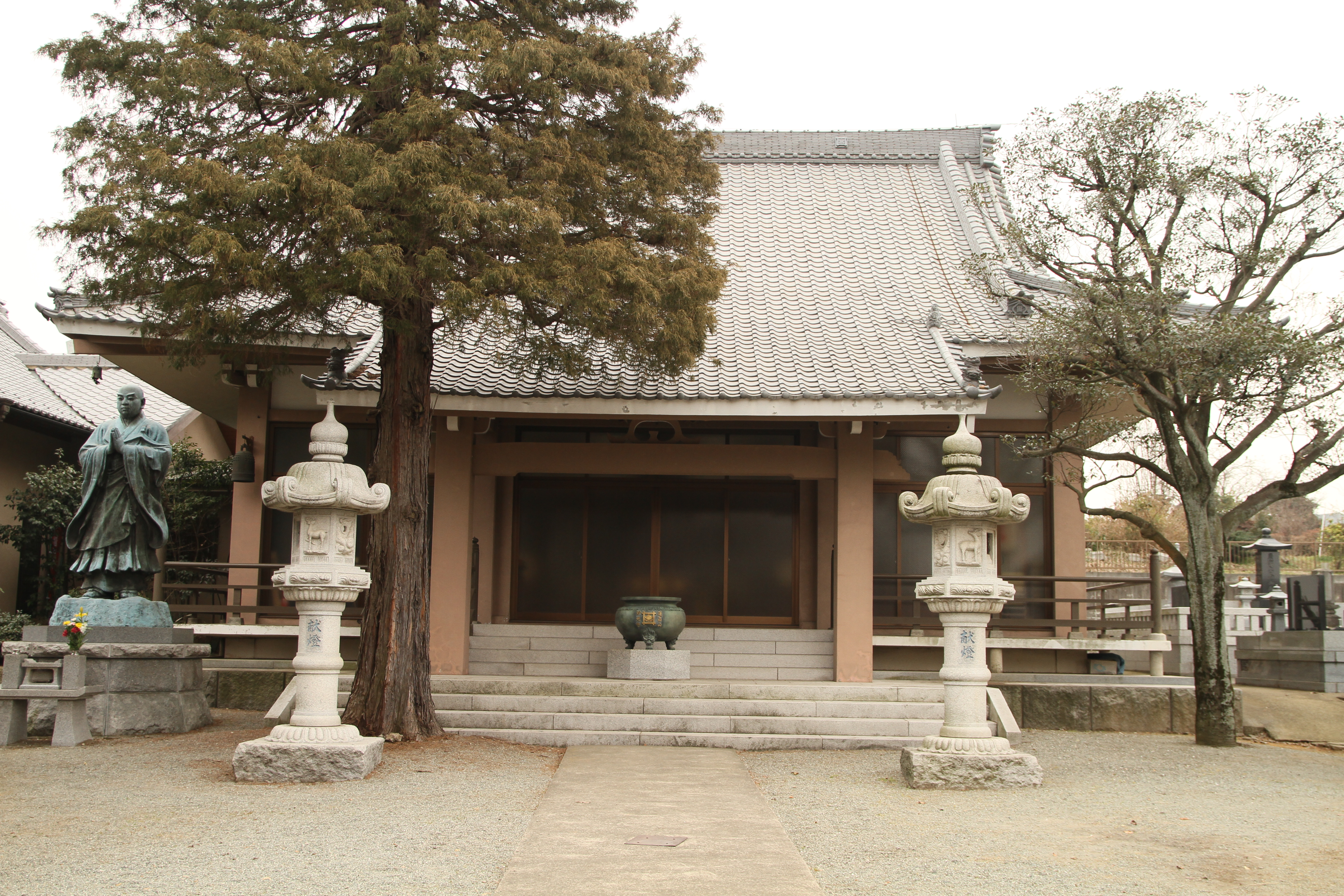 妙光寺（横浜市瀬谷区）本堂